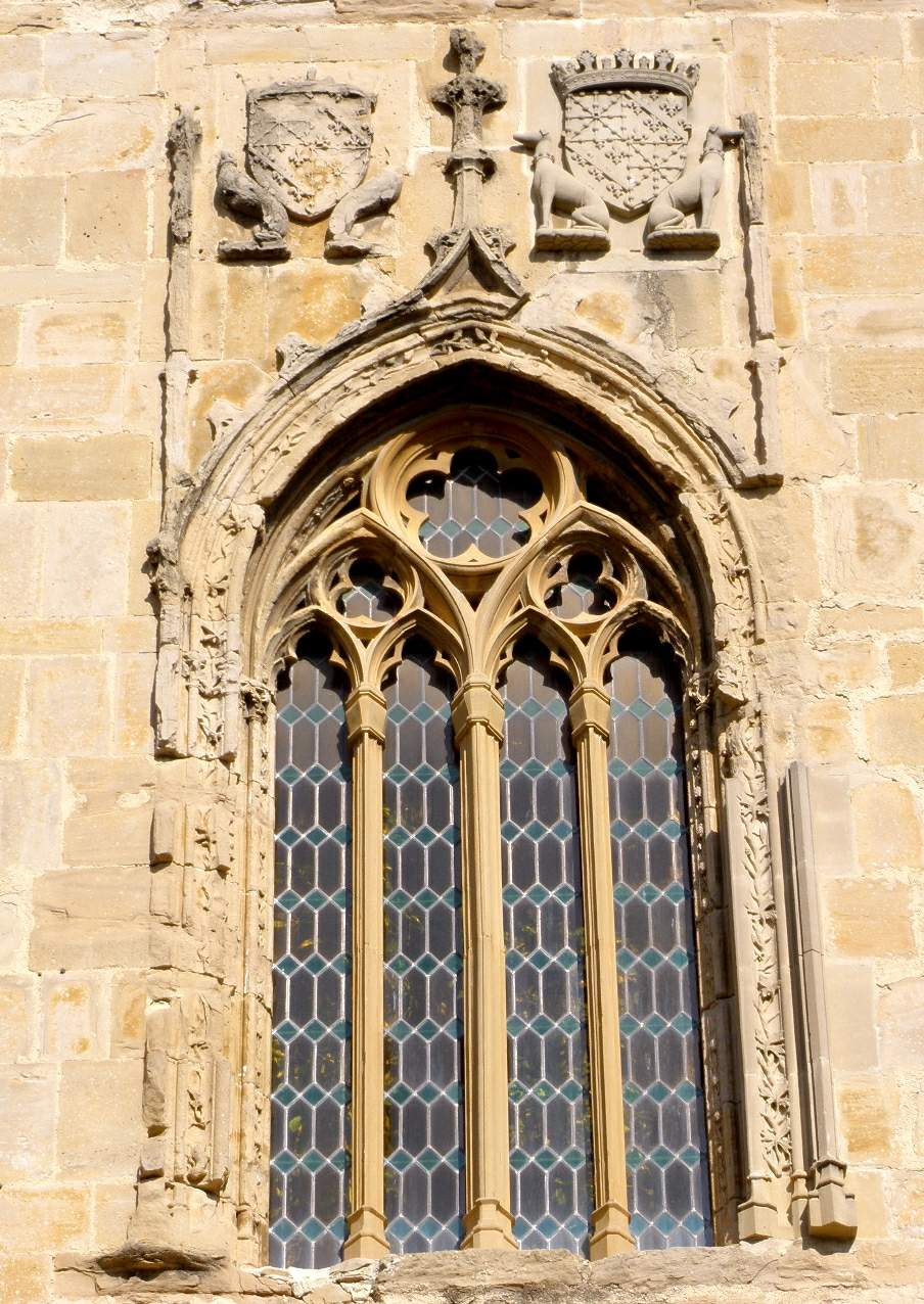 Castillo Viejo-Parador Nacional Principe de Viana (Olite, Navarra)